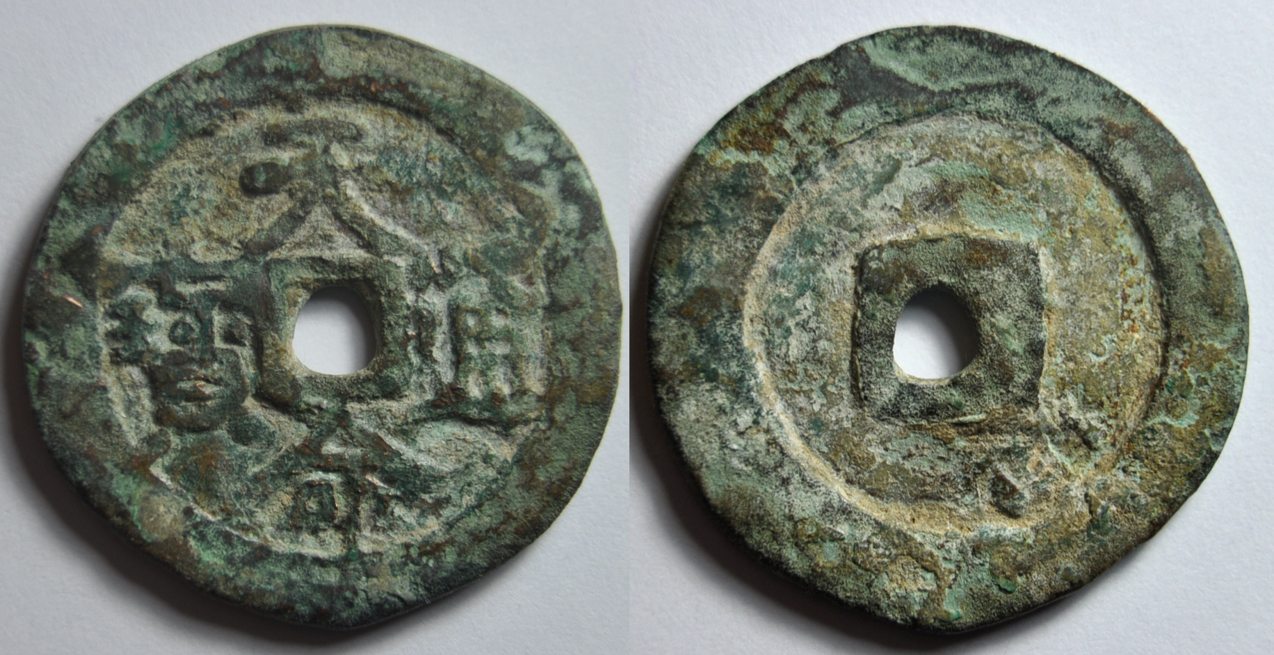 Une monnaie en cuivre de Nurhachi (1559-1626) fondateur de la dynastie Jurchen des Jin (1616-1636) qui devient la dynastie Qing après 1636 et qui gouverne la chine de 1644 à 1912. A/ Tian Ming tong bao (Monnaie courante du Mandat Céleste) R/ vide Diamètre : 25,4 g. Poids : 5,1 g. ce qui correspond à 1,2 qian au lieu de 1,6 qian. Remarque : Tout en unifiant les différentes tribus Jurchen, il se proclame khan c'est à dire roi en 1616 et en prend le nianhao de Tian Ming signifiant Mandat céleste. Il divise le peuple Jurchen en huit bannières : la population était répartie héréditairement dans ces bannières qui sont des divisions administratives et militaires. Les Jurchen prirent les noms de Mandchous après avoir envahi la Chine. Ils ont une langue de type toungouse et ont déjà gouverné une partie de la Chine sous la dynastie Jin (1115-1234). Référence : H22.4, MNIS3694 Indica de rareté : R9, commune